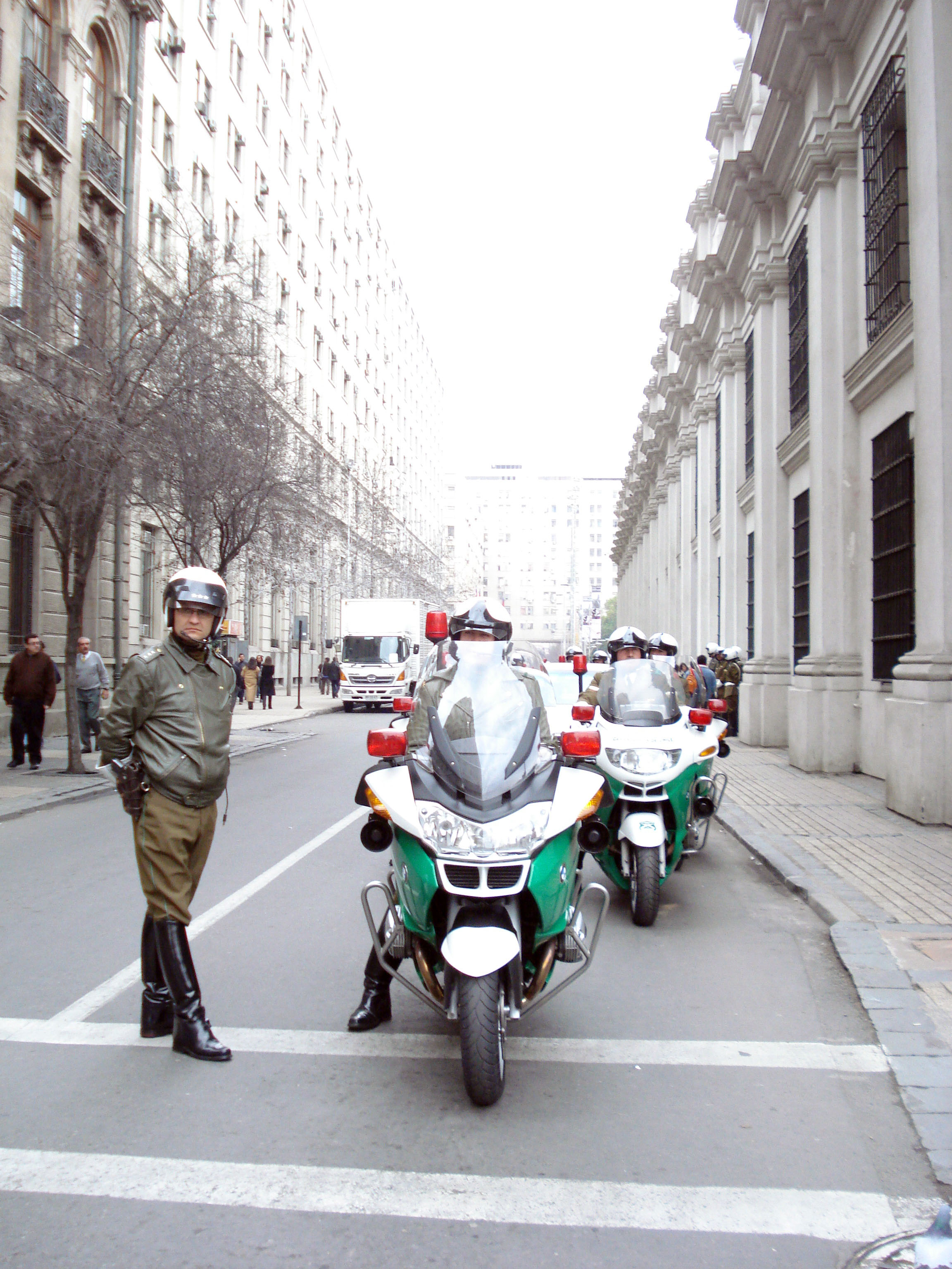 Motoristas de Carabineros de Chile, al costado de el Palacio de La Moneda.